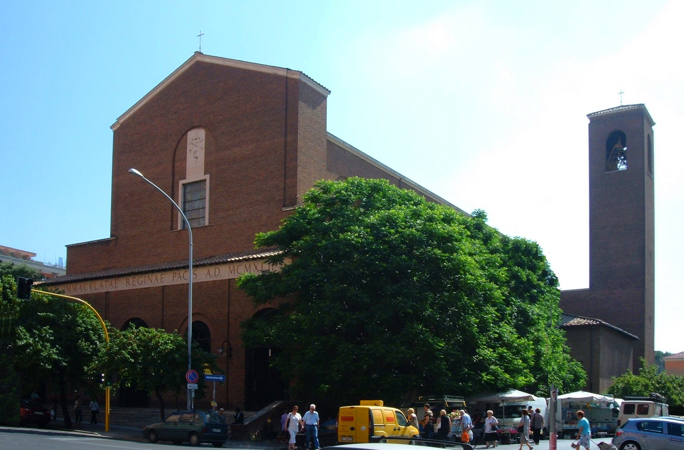 Chiesa di Santa Maria regina Pacis, a Roma, nel quartiere Gianicolense